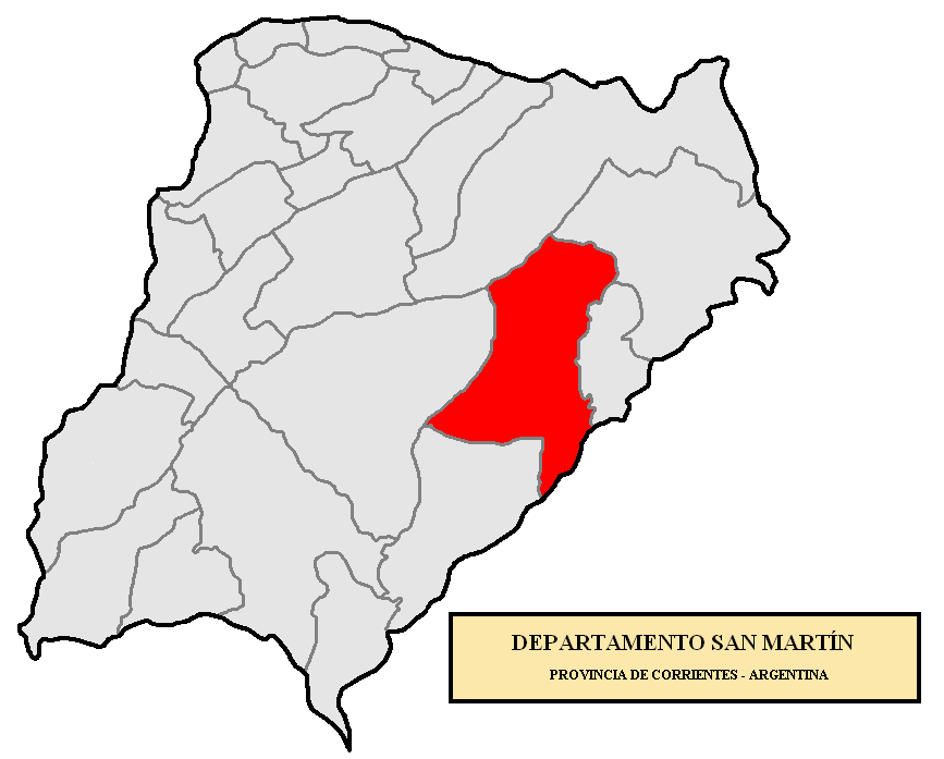 Localización del Departamento San Martín en la provincia de Corrientes, Argentina Localización del Departamento San Martín, en la provincia de Corrientes, Argentina.